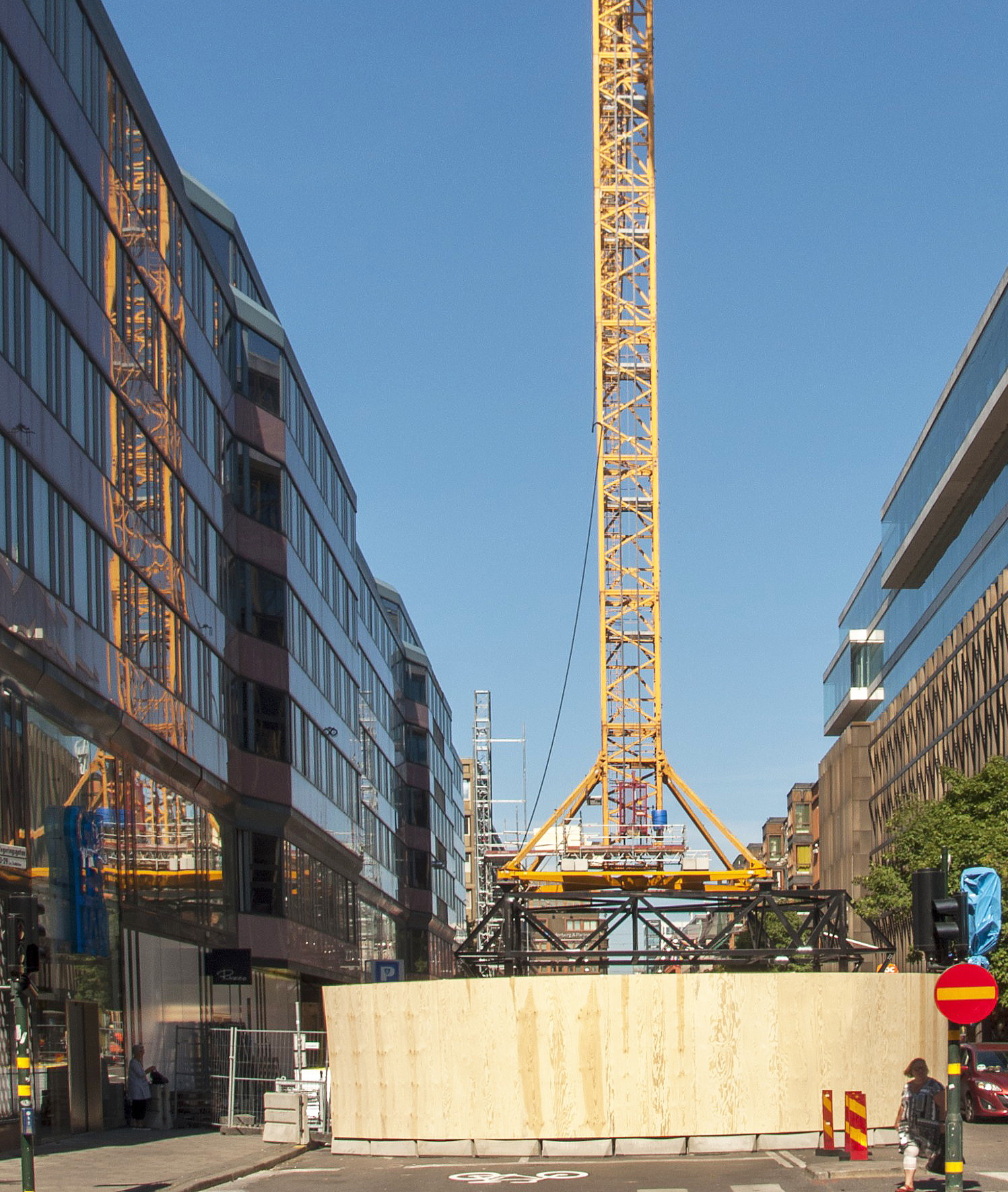 Regeringsgatan norrut, fastigheten Trollhättan 31 t.v. med sin ursprungliga fasad